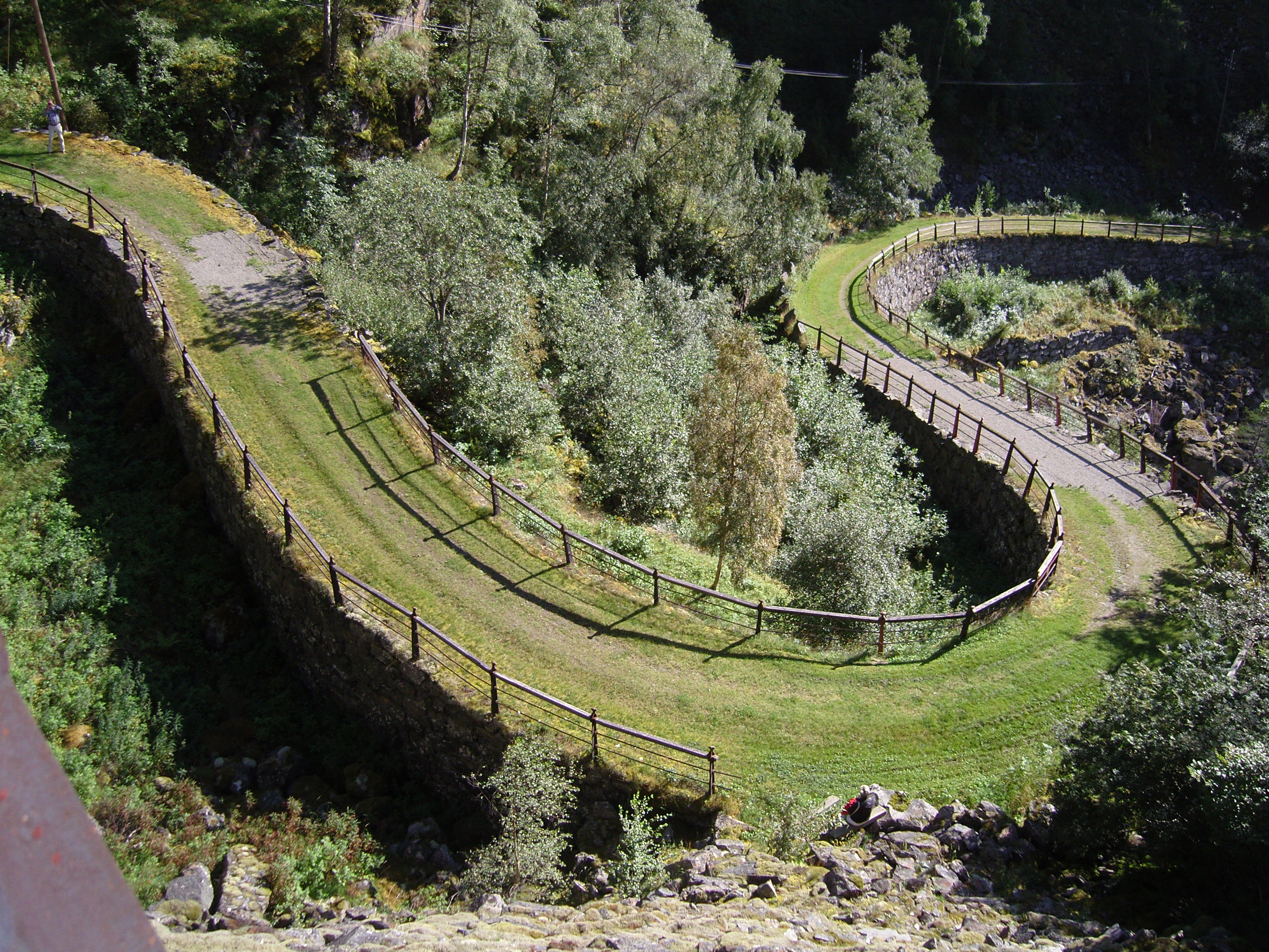 Vindhellavegen i Lærdal, Norge